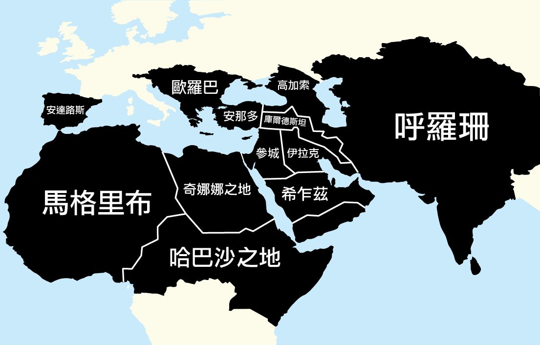 中文（香港）: 「伊斯蘭國」發佈的領土遠景圖